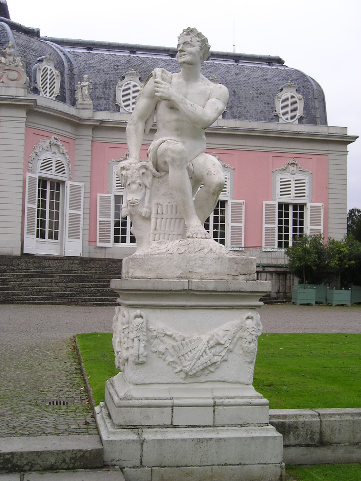 Pan in Schloss Benrath